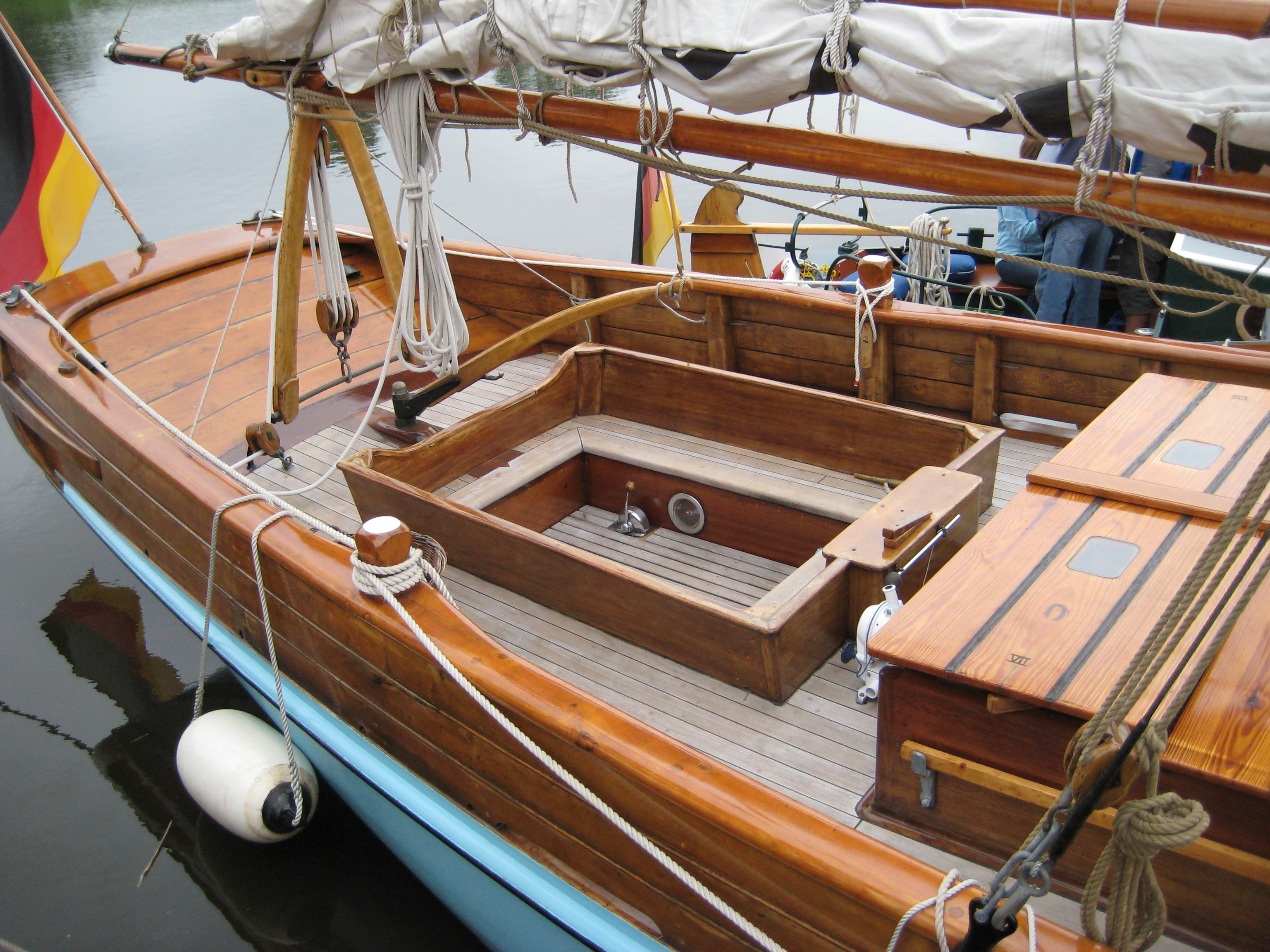 Detail der Auriga, aufgenommen auf dem dritten Störschipperfest in Itzehoe